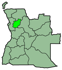 A map from province Cuanza Norte, Angola